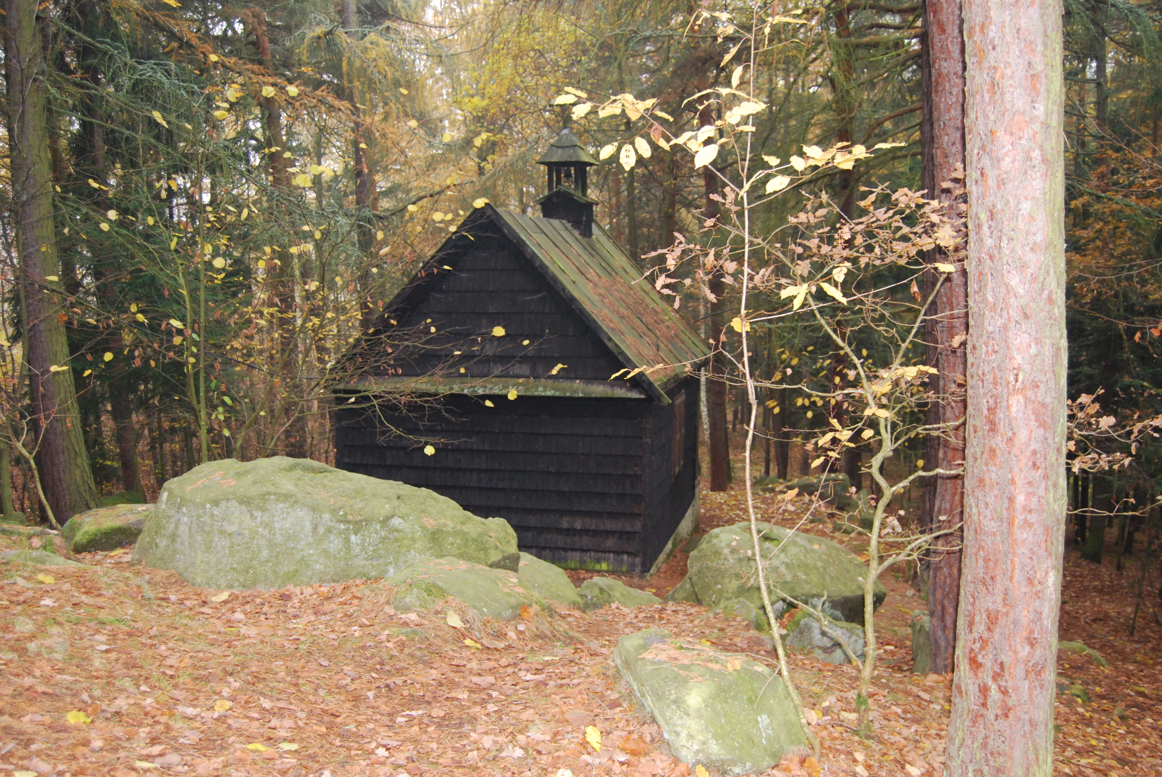 Poustevna.Městys Čestice.Okres Strakonice.Česko.